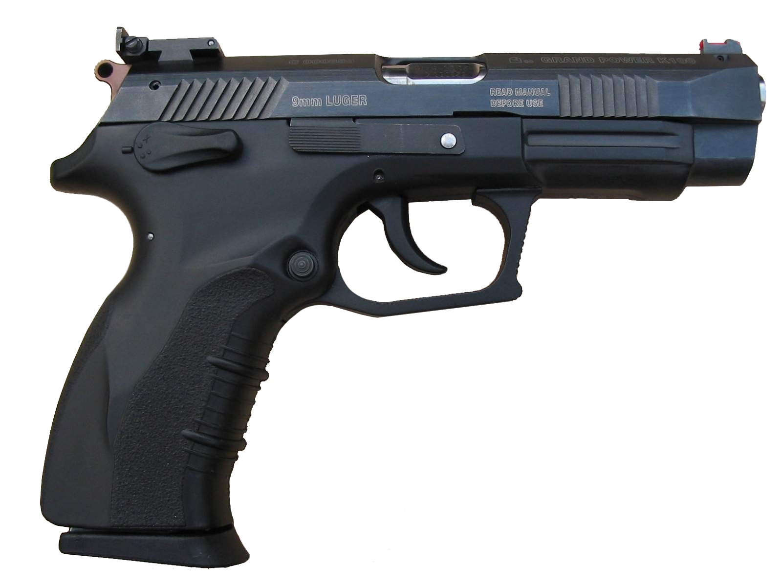 Grand Power pistol